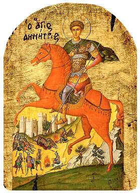 Древнеболгарская икона. Чудо вмч. Димитрия о царе Калояне. XVII в. (?)